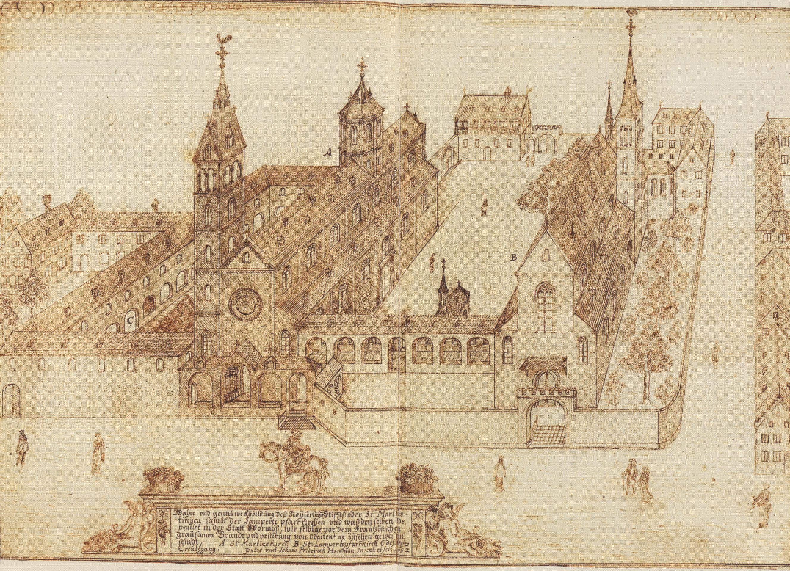 Das Martinsstift Worms vor der Zerstörung von 1689, Sepiazeichnung von Peter Hammann, 1692